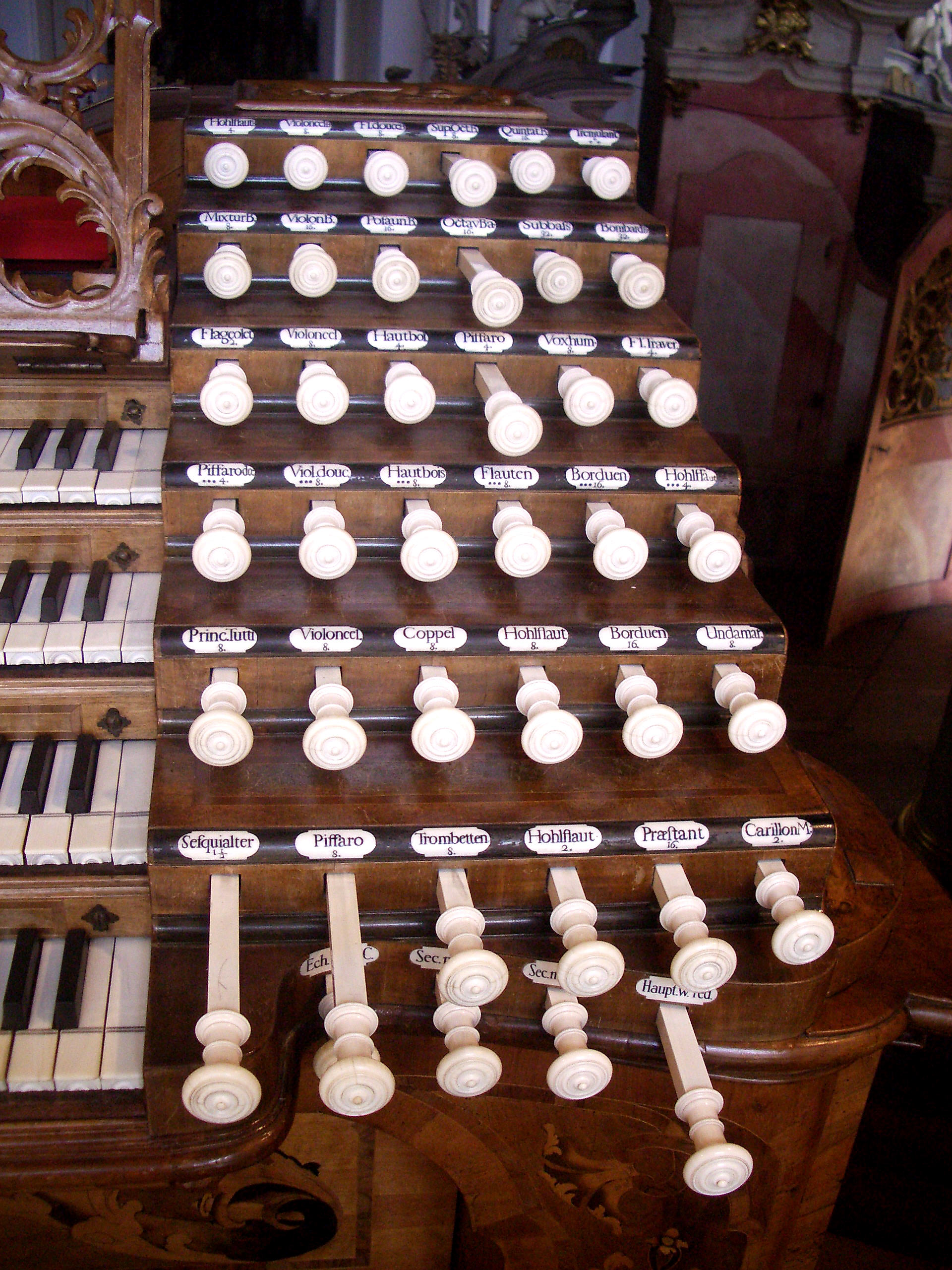 Weingarten, Germany: Basilika St. Martin, Organ by Joseph Gabler